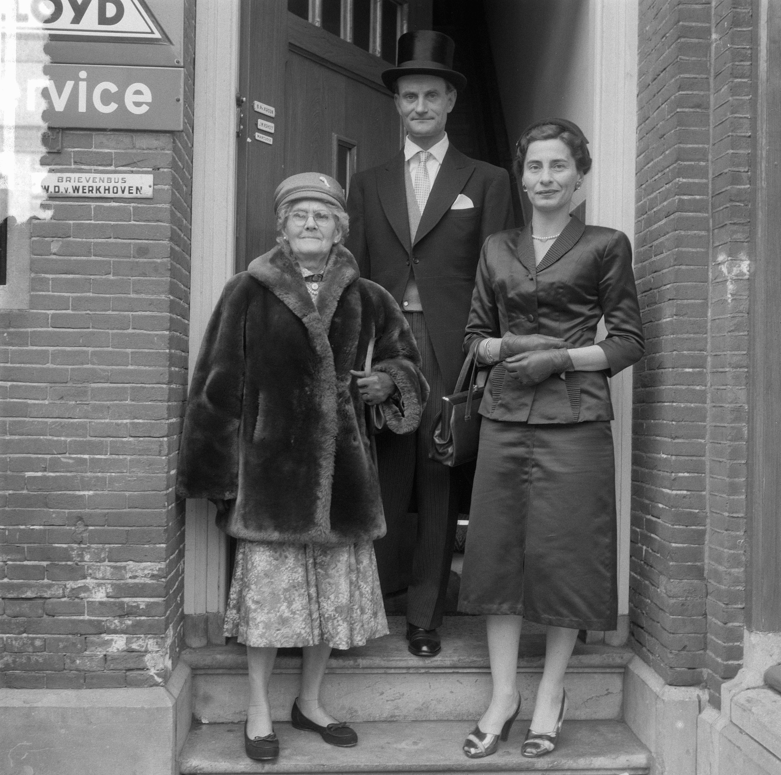 Collectie / Archief : Fotocollectie Anefo Reportage / Serie : [ onbekend ] Beschrijving : Bruiloft Dr. Pimentel (tandarts) Datum : 26 april 1957 Trefwoorden : bruiloften, tandartsen Fotograaf : Pot, Harry / Anefo Auteursrechthebbende : Nationaal Archief Materiaalsoort : Negatief (zwart/wit) Nummer archiefinventaris : bekijk toegang 2.24.01.03 Bestanddeelnummer : 908-5254